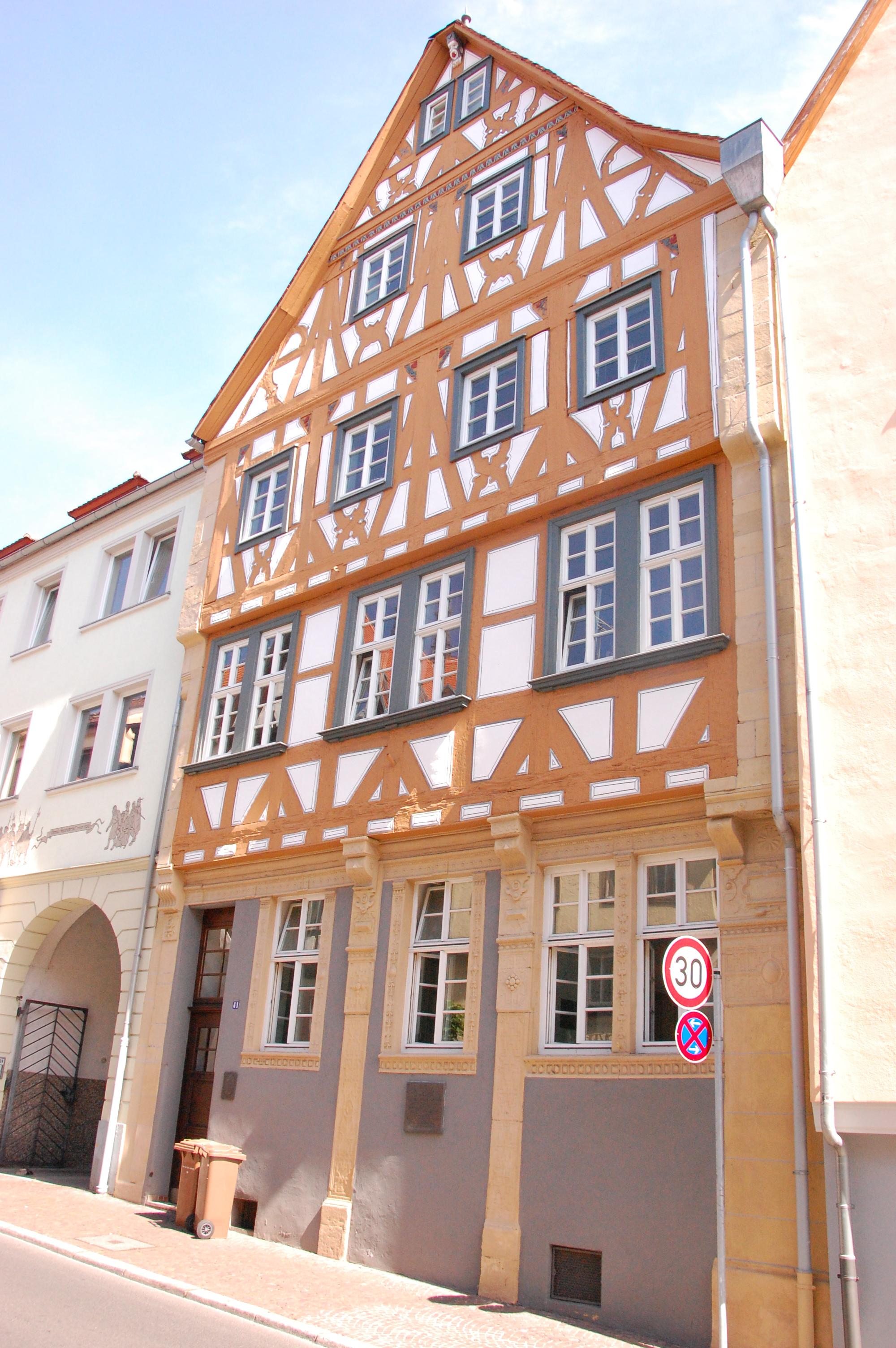 Das Haus Bratfisch ist vermutlich nach Conz Bratfisch, einen ehmeligen Bürgermeister (um 1435) von Aschaffenburg benannt.